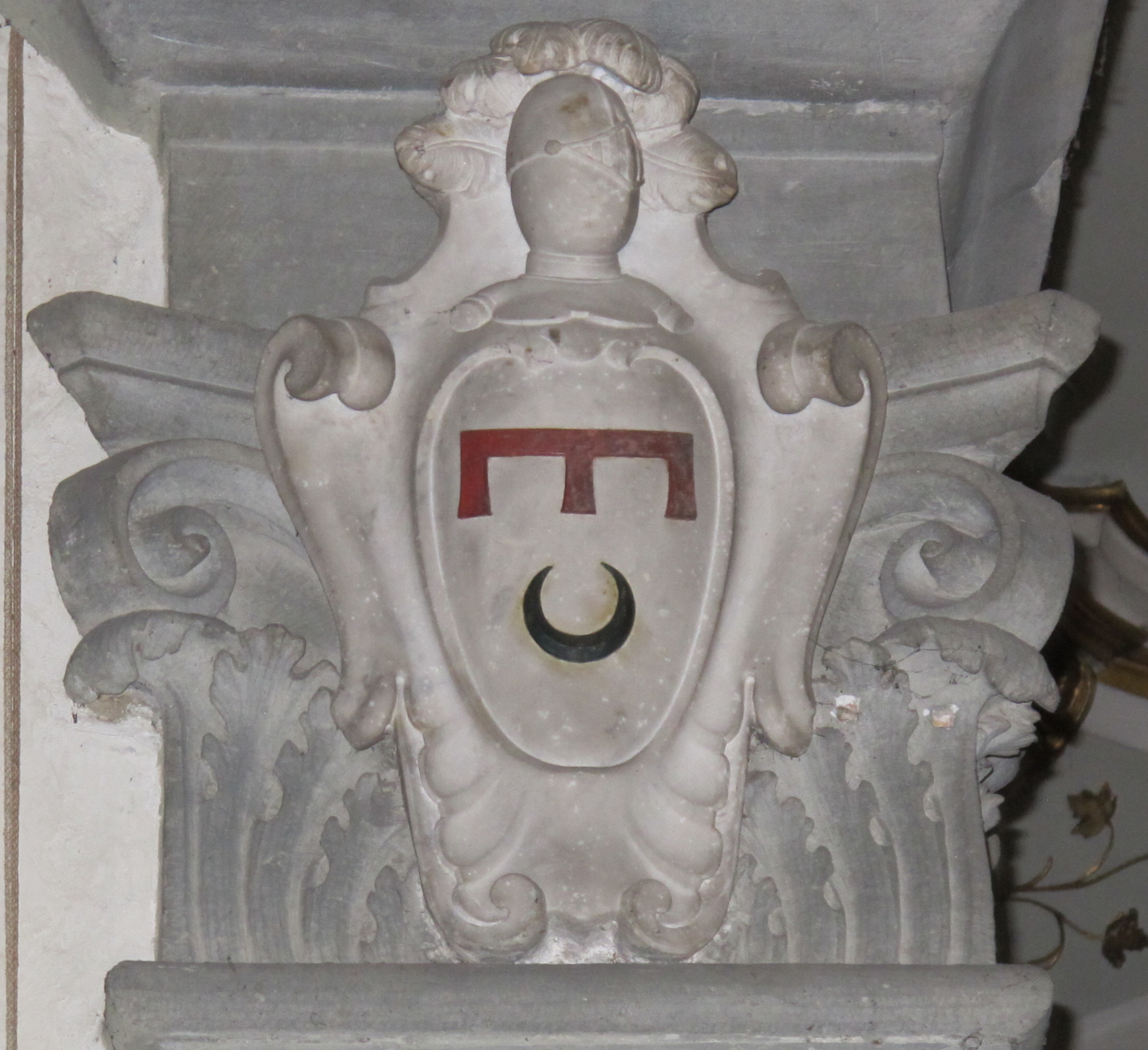 Santa maria maddalena de' pazzi, fi, stemma canigiani 2